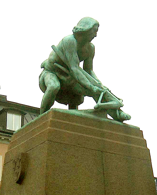 Kornhamnstorg, Gamla stan, Stockholm